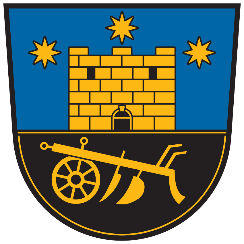 Wappen von Neuhaus